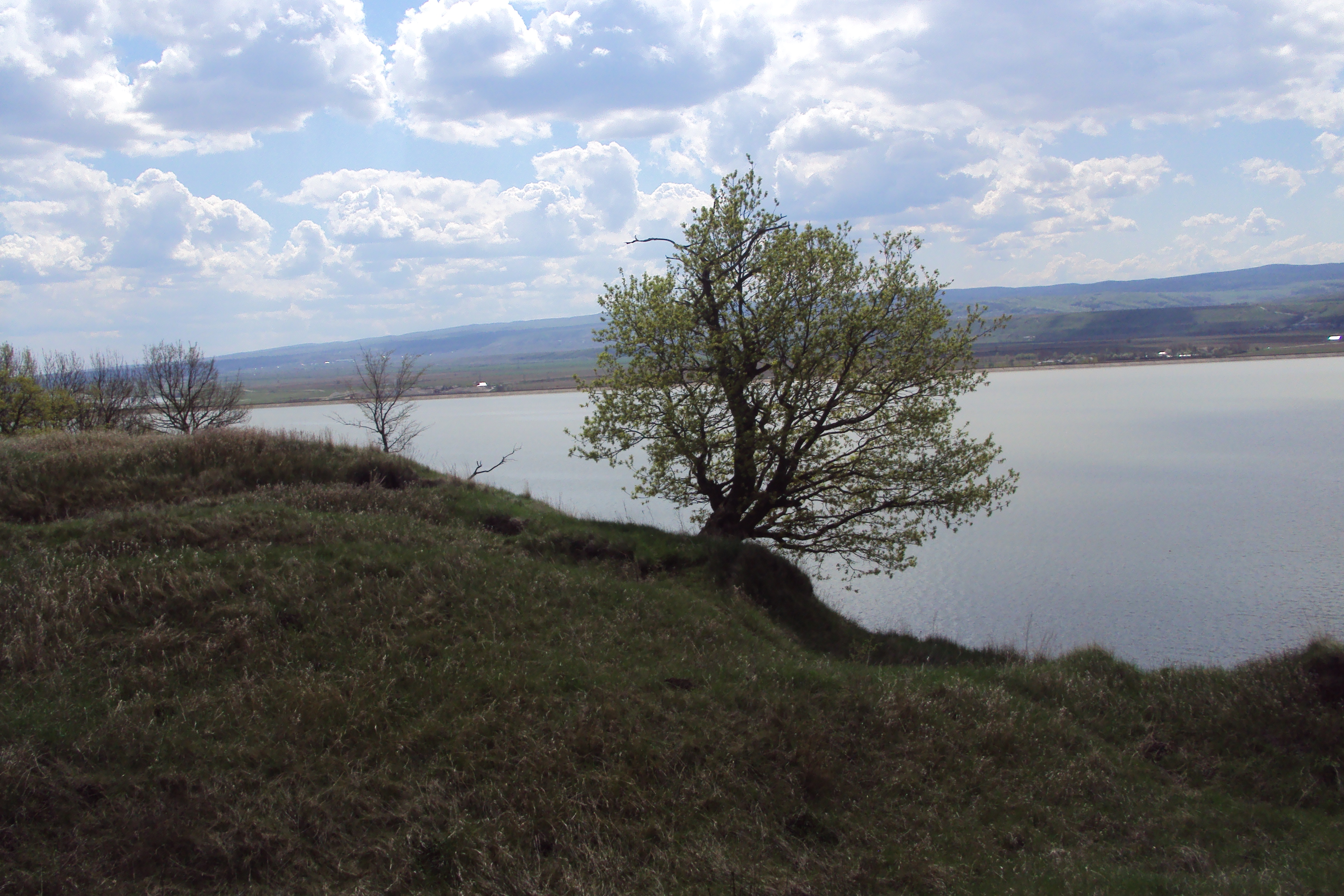 Cetatea "Tamasidava" 01